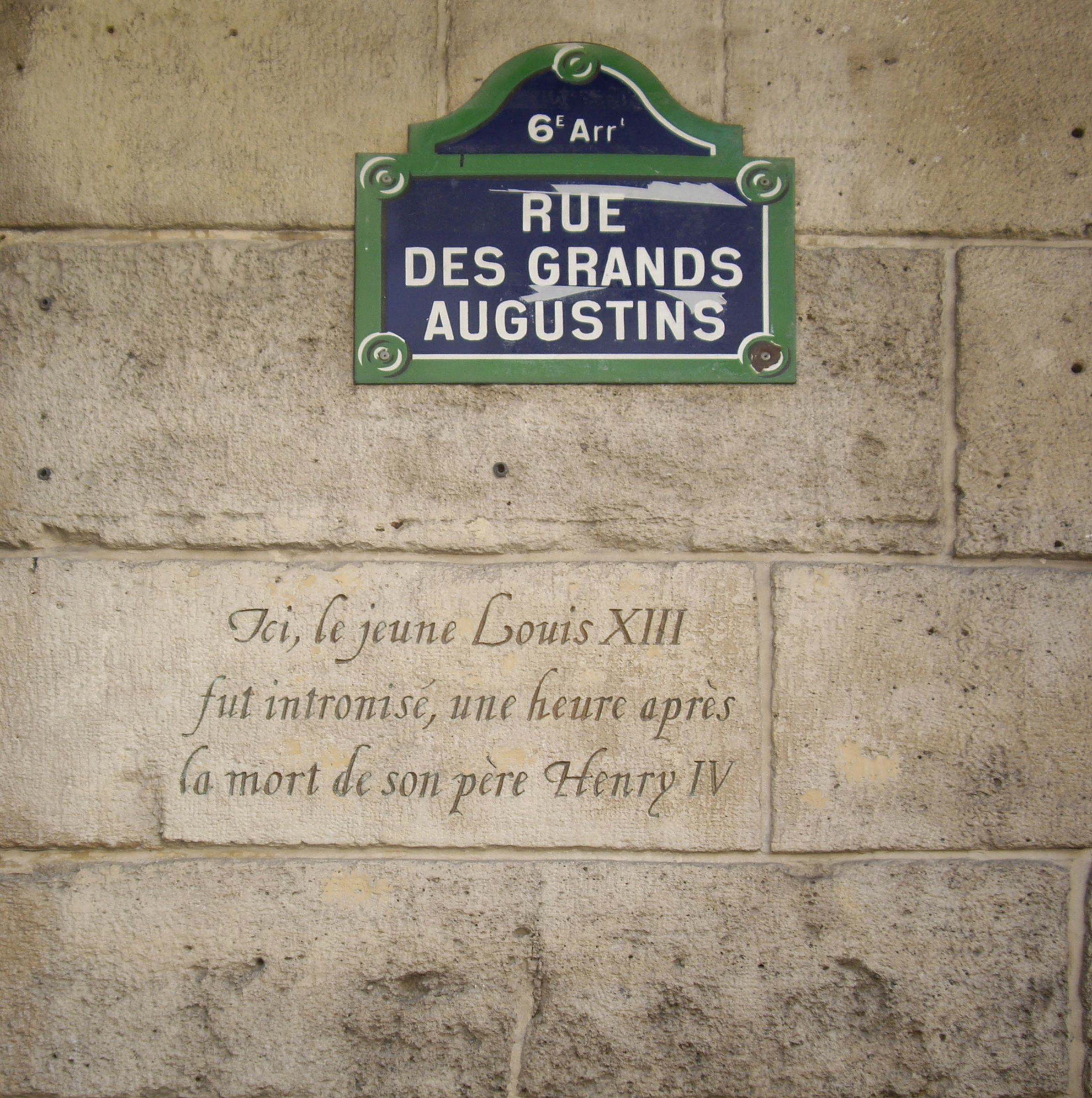 Inscription murale au n° 8 de la rue des Grands-Augustins, Paris 6e : « Ici, le jeune Louis XIII fut intronisé, une heure après la mort de son père Henry IV. »